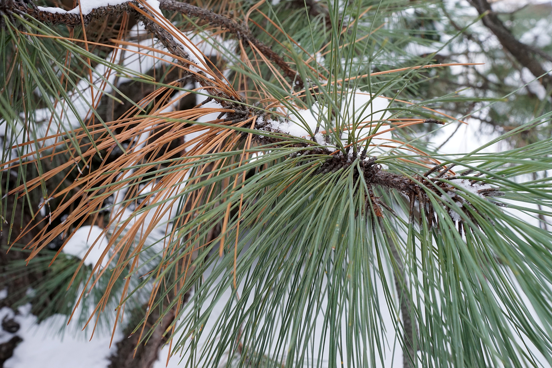 Pinus arizonica (Arizona Pine) new and senesced foliage